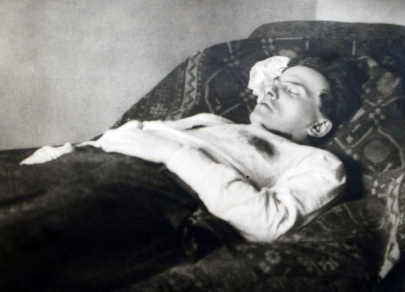 Тело В. Маяковского. 14 апреля 1930 года